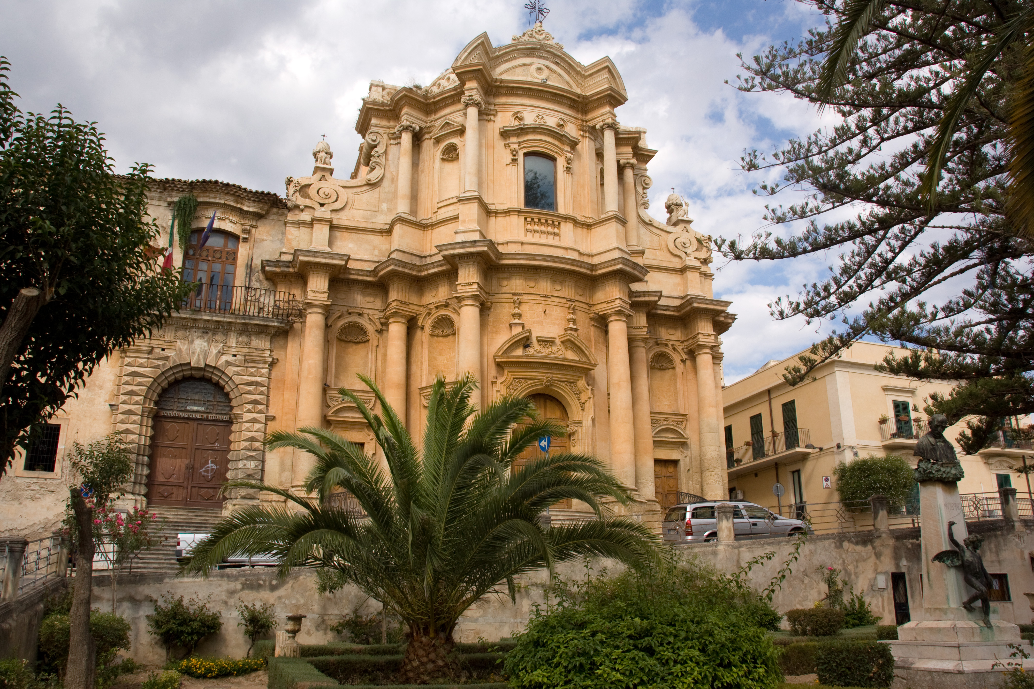 Chiesa di San Domenico, Piazza XVI Maggio,Noto, Sicile, Italie.